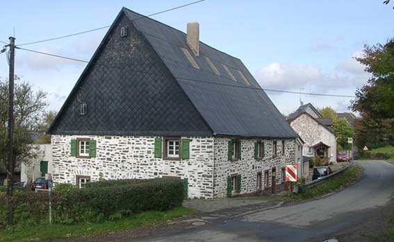 Dorfmittelpunkt Breckerfeld-Berghausen (Berghausen 2)